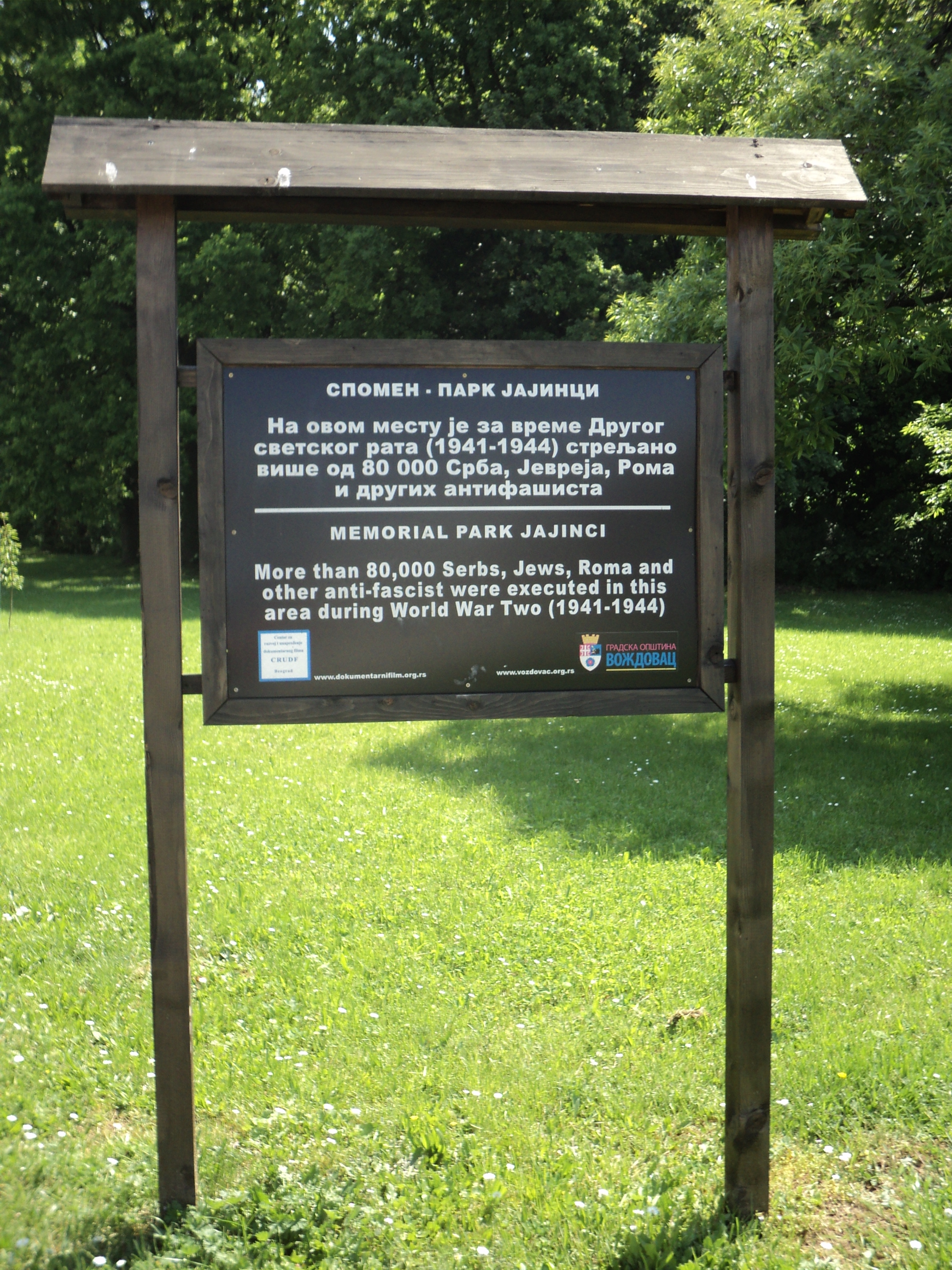 Info-tabla u spomen-kompleksu Jajinci